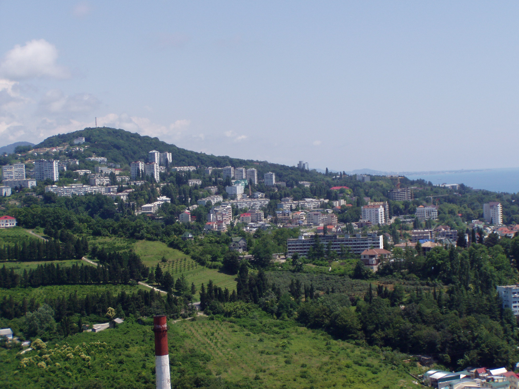 9 July 2007 Участник:Yufereff